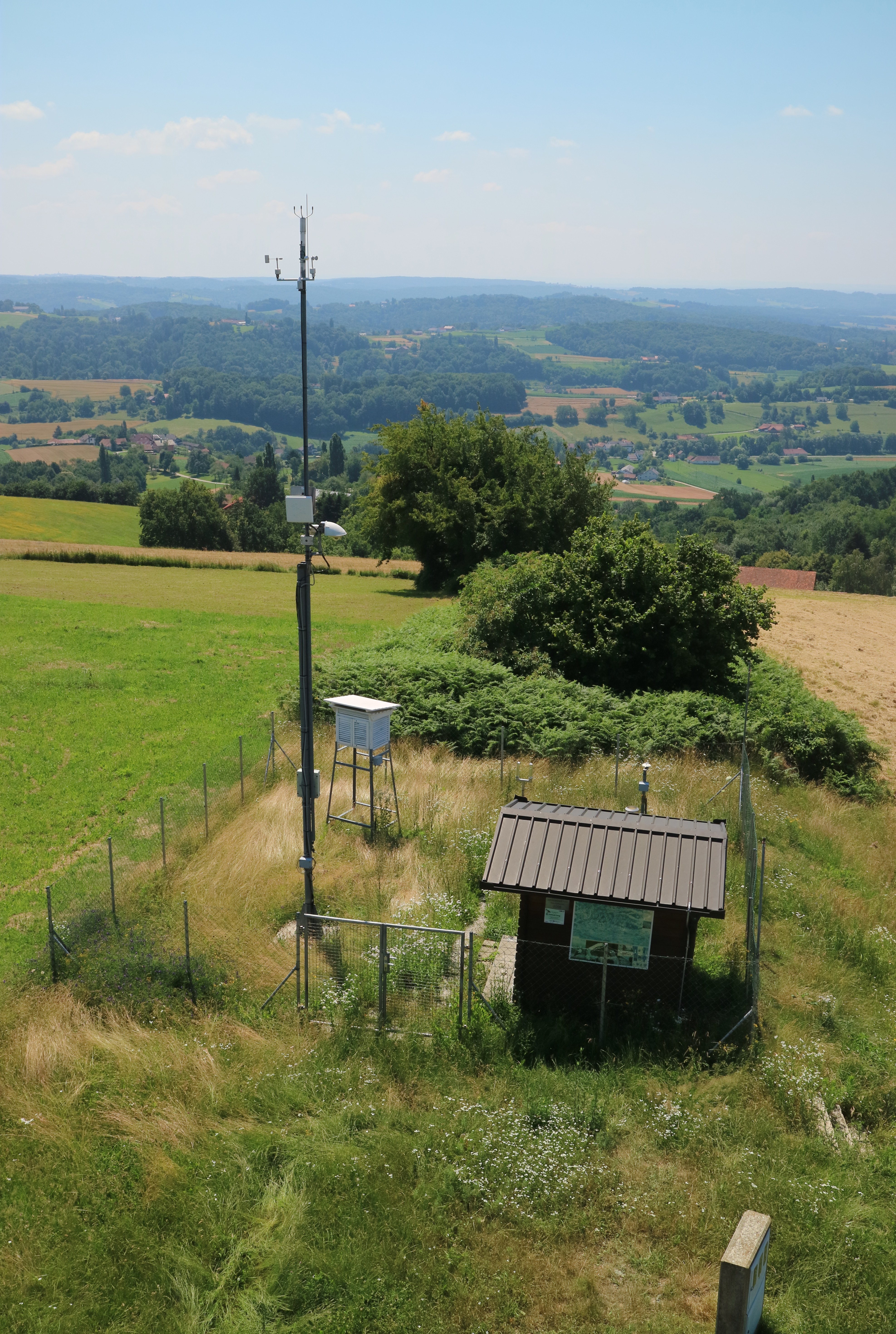 Meteorologische Station am Sotinski breg (Stadelberg), Gemeinde Rogašovci, Slowenien